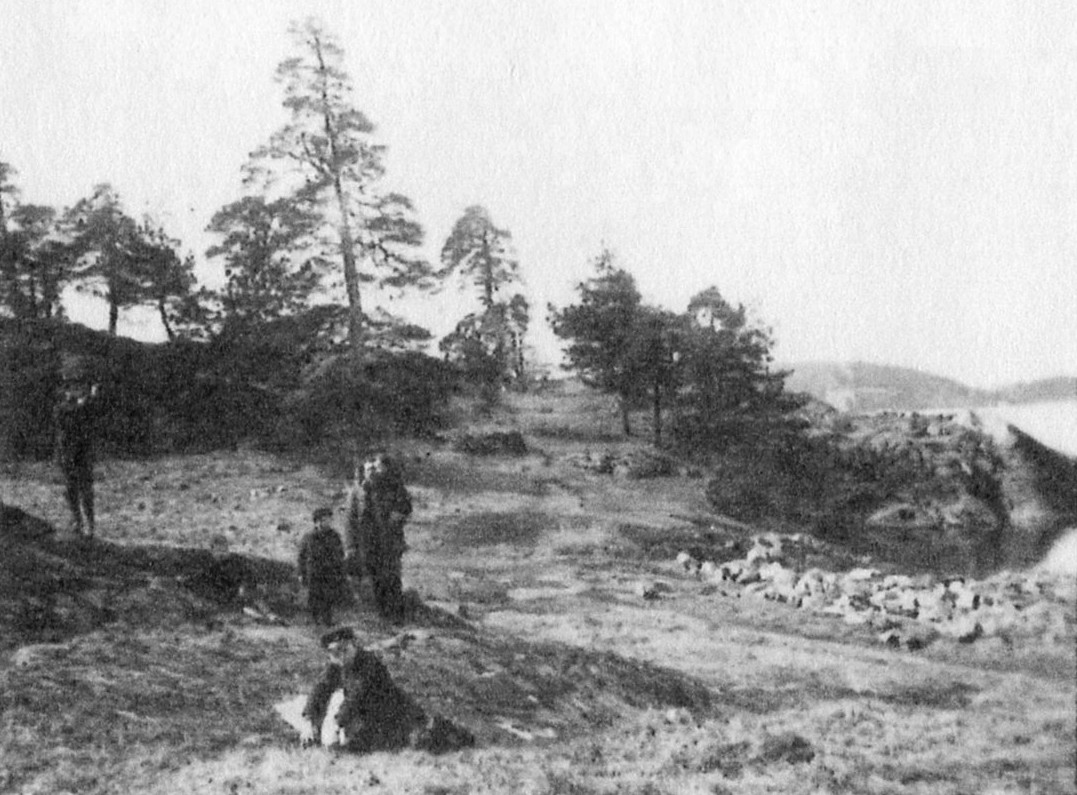 Nordvästra Kungsholmen, området för planerade "Hornsbergs villastad"